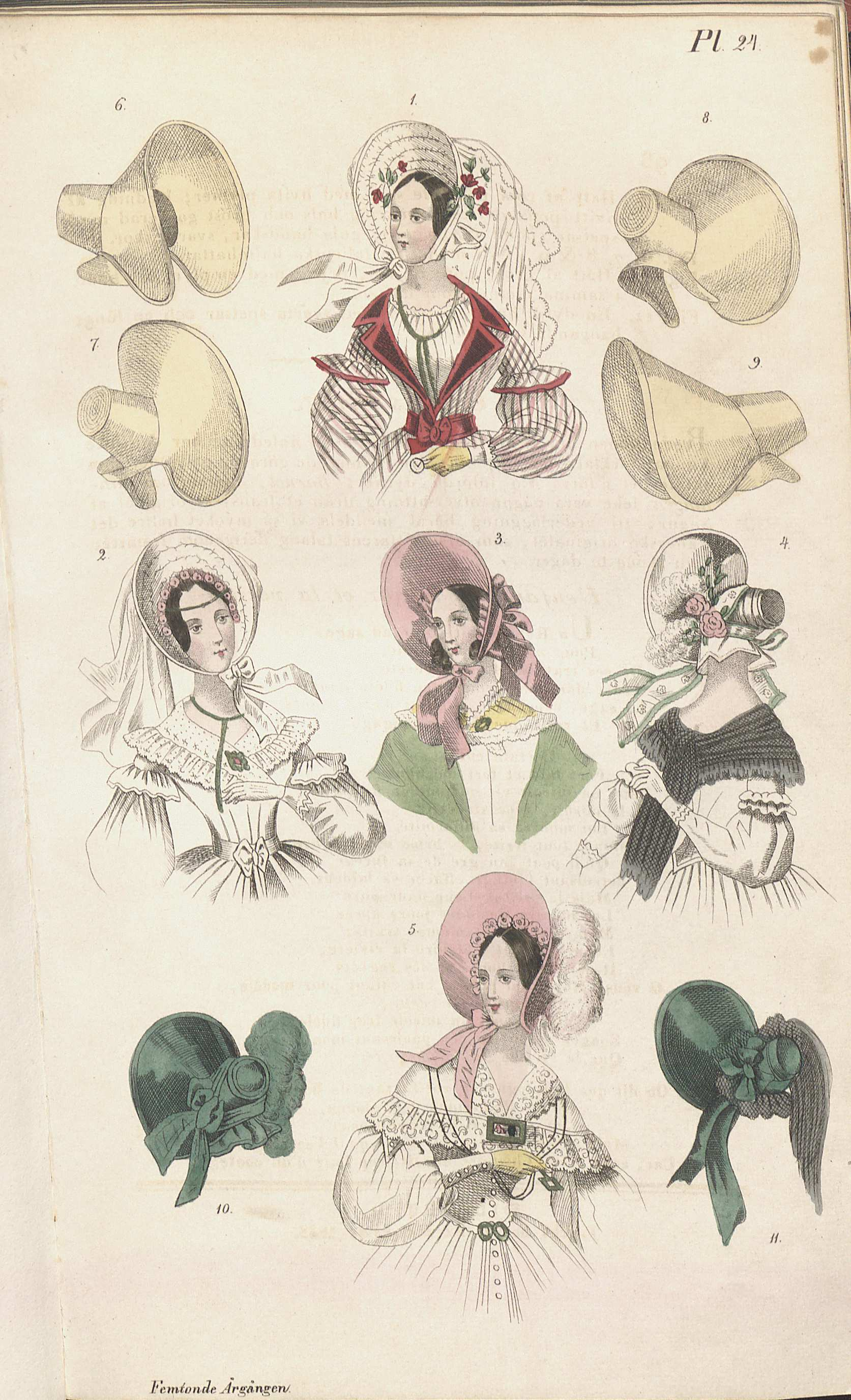 Hatt; Capote; Blommor; Slöja; Rock; Band; Sjal; Fjädrar; Plymer; Spets